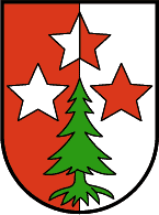 Damüls, Vorarlberg: Ein von Rot und Silber gespaltener Schild. Auf der Spaltlinie, aus dem Schildfuß sich erhebend, eine natürliche Bregenzerwäldertanne, begleitet von einem fünfzackigen silbernen Stern im roten und einem roten Stern im silbernen Feld. Über der Spitze der Tanne ein gleichartiger Stern in gewechselten Farben. (Verleihung: 29. August 1967)